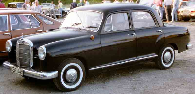 Mercedes-Benz 180B Limousine 1961